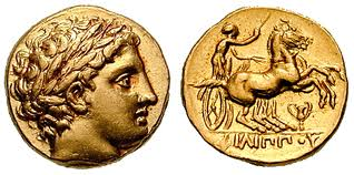 Статер